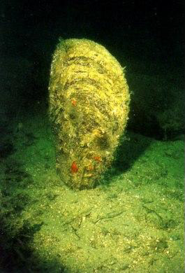 Esemplare di Pinna nobilis presente lungo la costa siciliana dello Stretto di Messina (per concessione di Salvatore Giacobbe) Pinna nobilis specimen close to sicilian coast of Messina Straits (permission from Salvatore Giacobbe) OTRS#2006091310007174